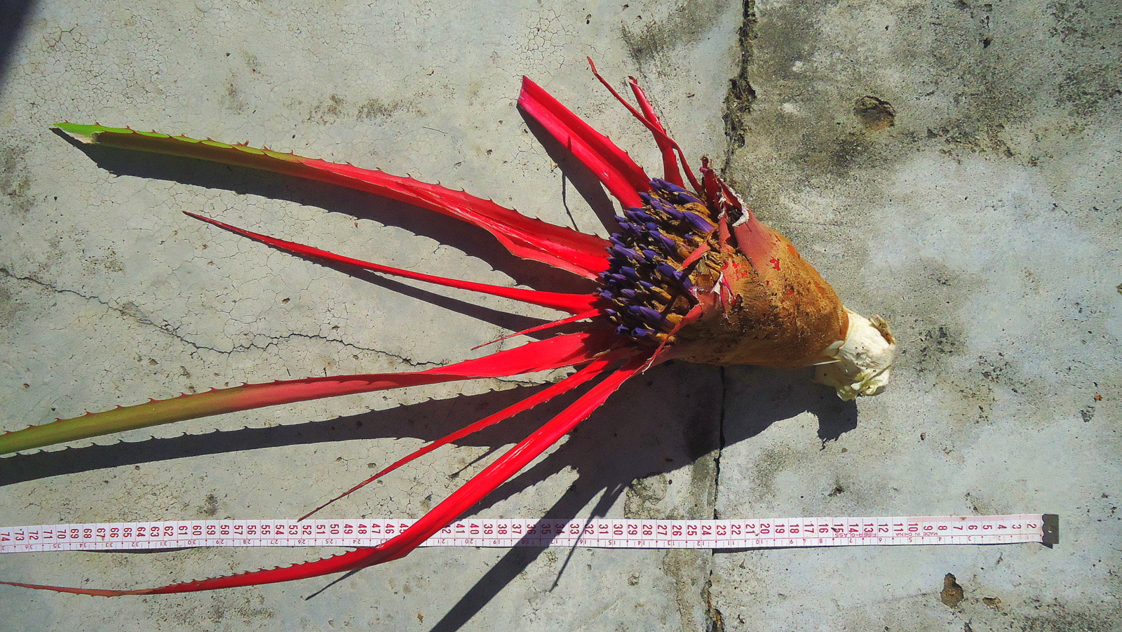 Bromelia unaensis Leme & Scharf